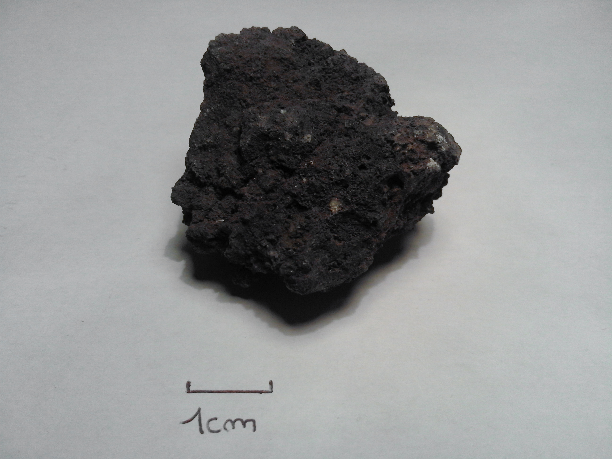 Basalte bulleux (Hérault, France)